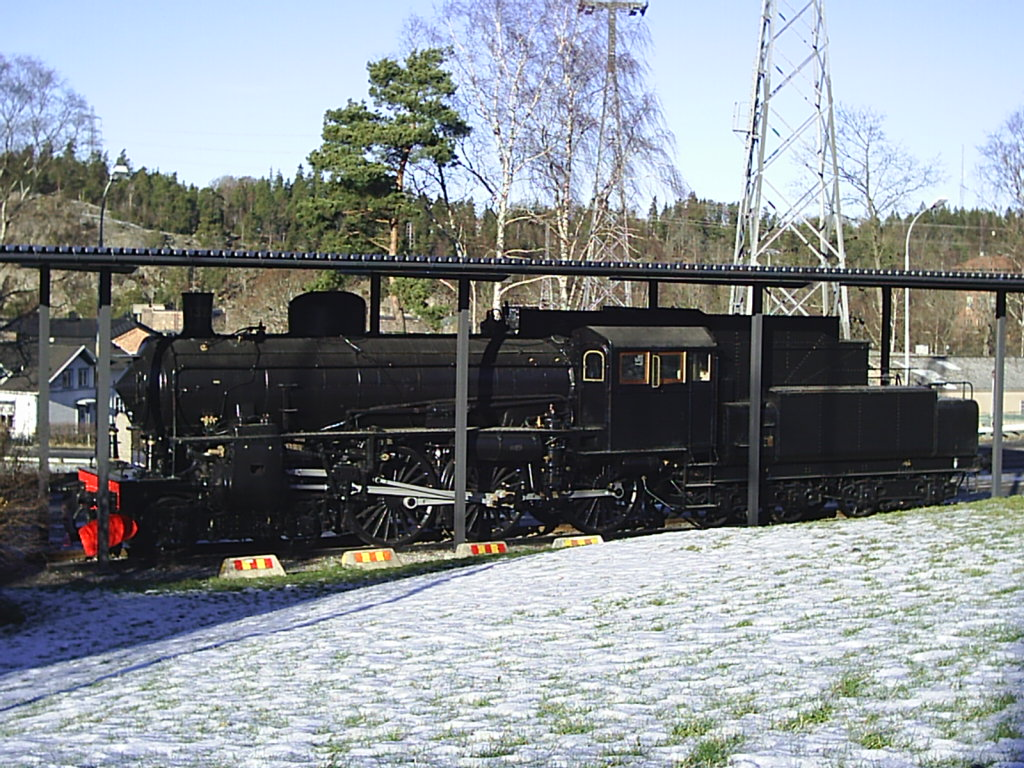 Lokomotiv tillverkat 1917 vid NOHABs fabrik i Trollhättan. Tillverkningsnummer 1115. Loket är placerat vid Innovatum på f.d. Nohabs industriområde i Trollhättan. Tubaist 2 februari 2005 kl.09.06 (CET) Fotograf: Tubaist